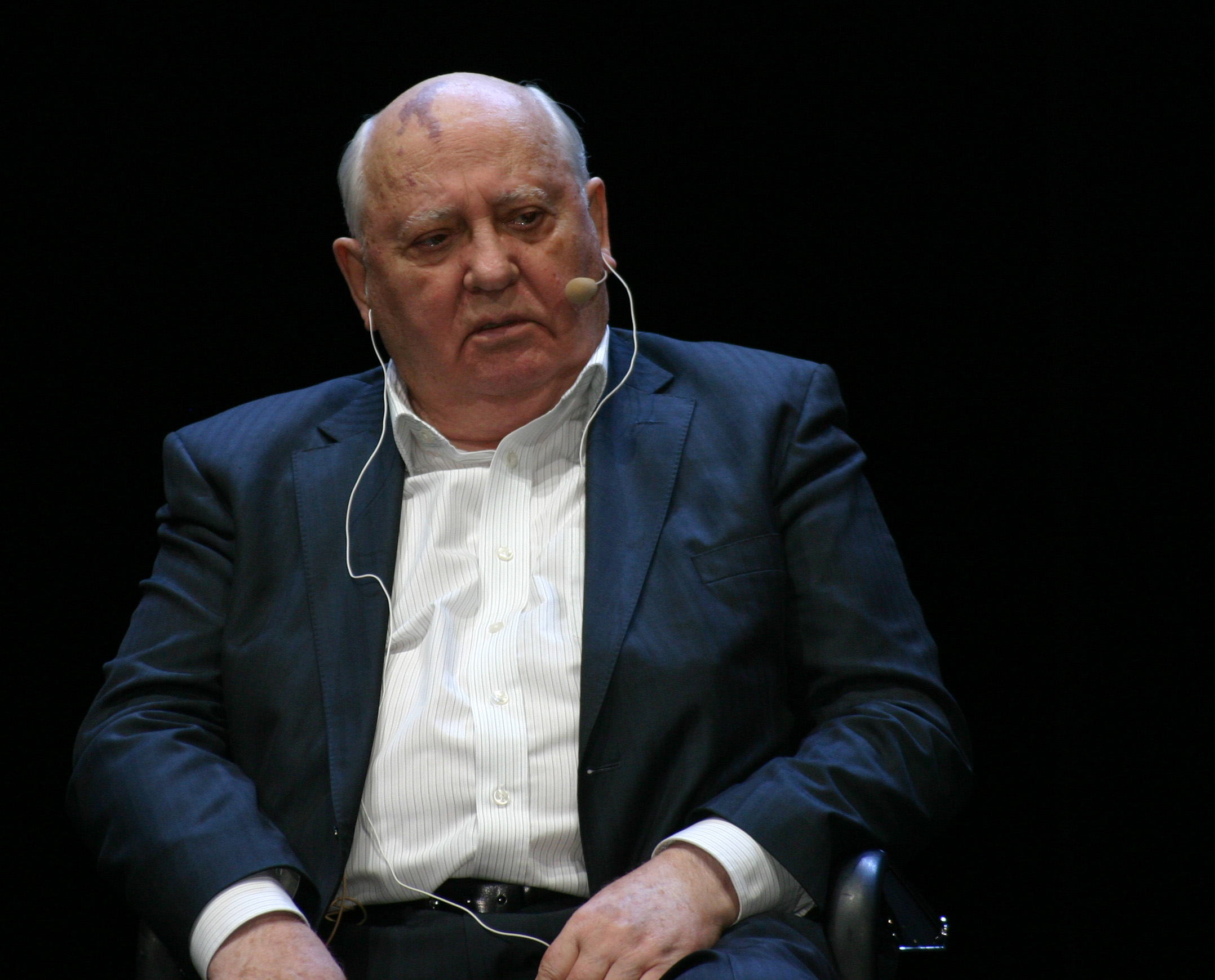 Michail Gorbatschow während der Deutschlandpremiere seines Buches „Alles zu seiner Zeit. Mein Leben“ im Berliner Ensemble.Михаил Горбачев во время немецкой премьеры своей книги «Все в своё время. Моя жизнь» в Берлинском театре «Берлинер ансамбль»